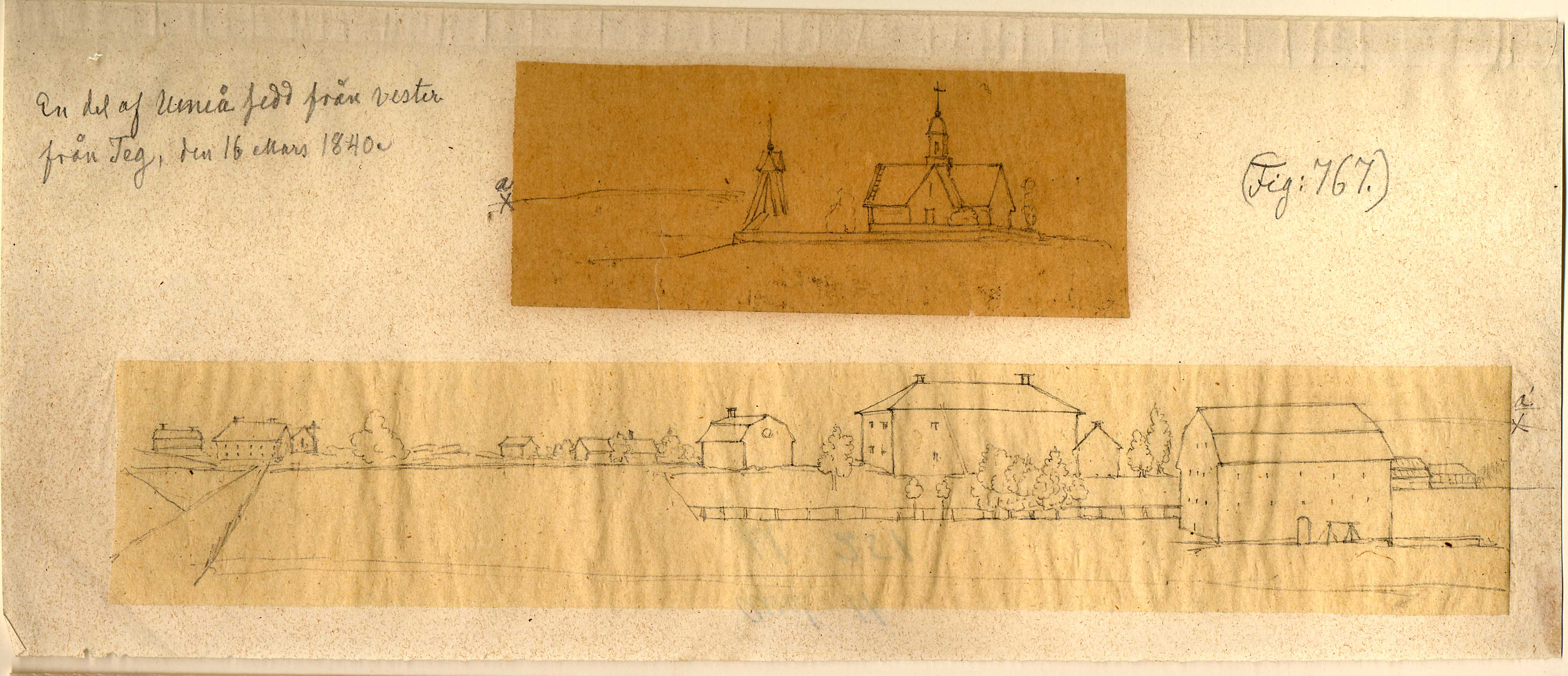 "En del af Umeå sedd från vester från Teg, den 16 Mars 1840."